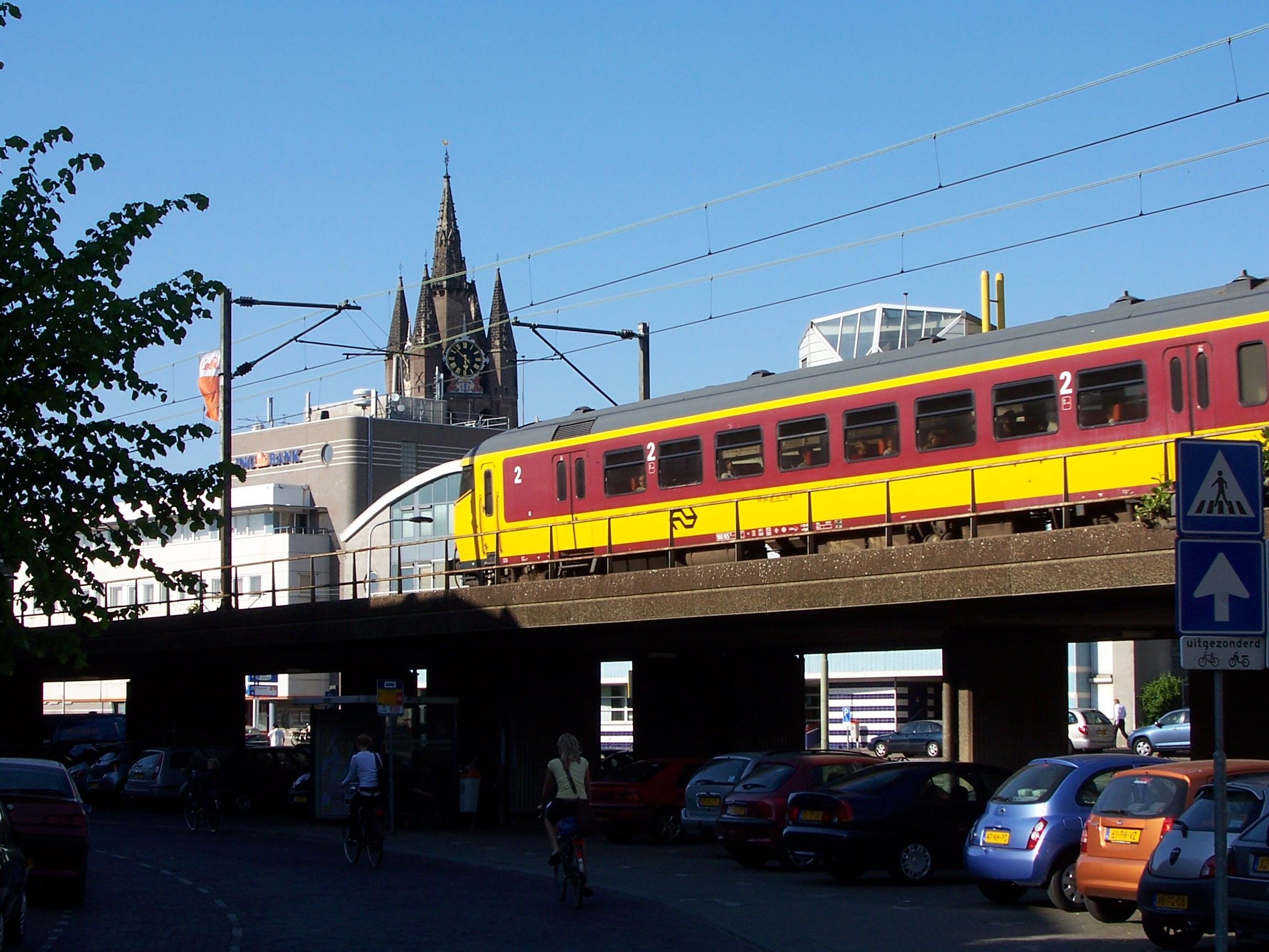 Treinbrug Delft